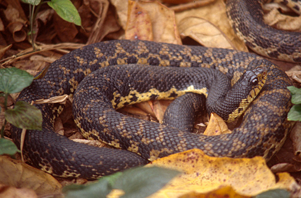 Malagasy giant hognose snake (Leioheterodon madagascariensis)